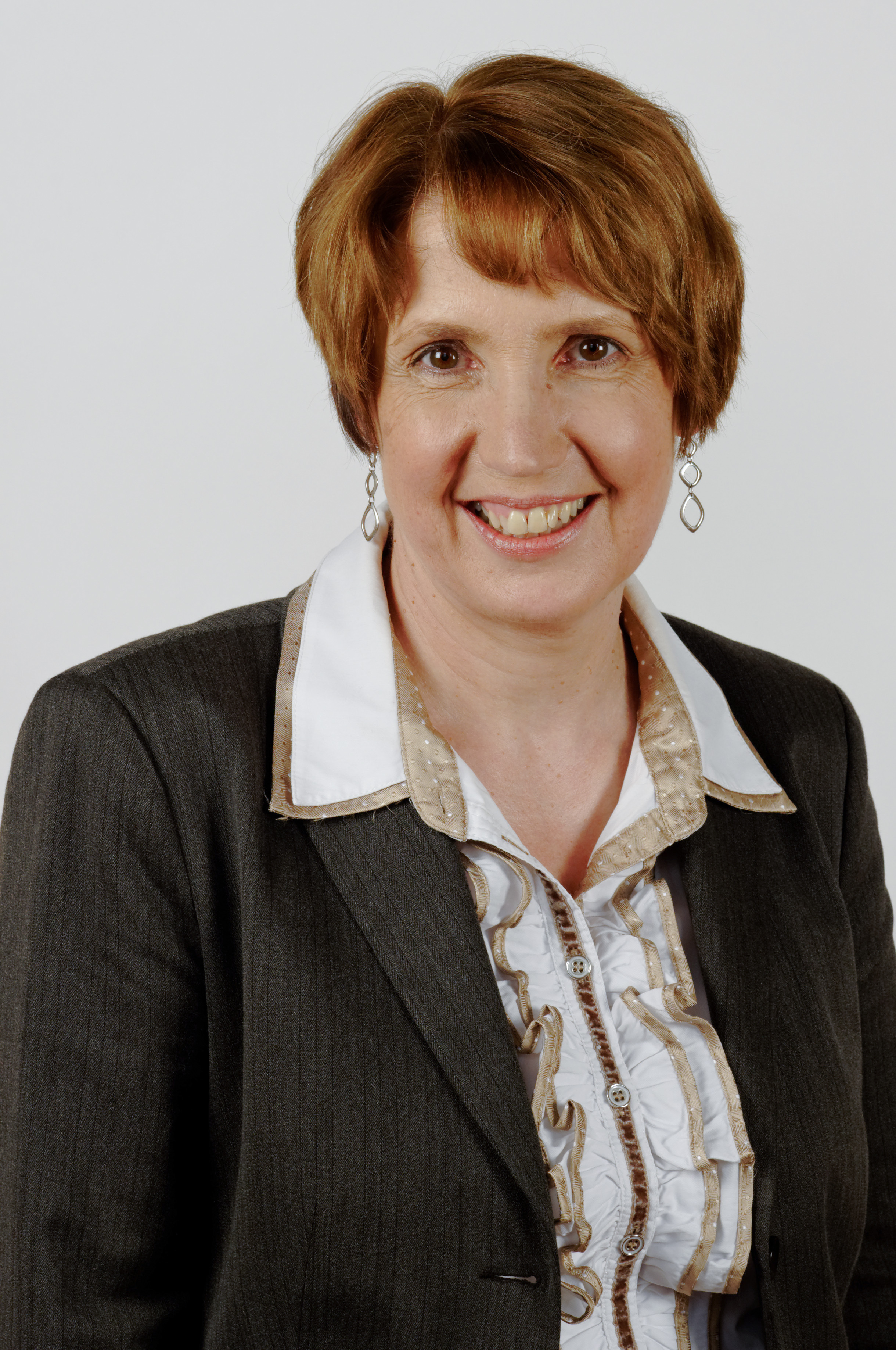 Landtagsprojekt Bayern